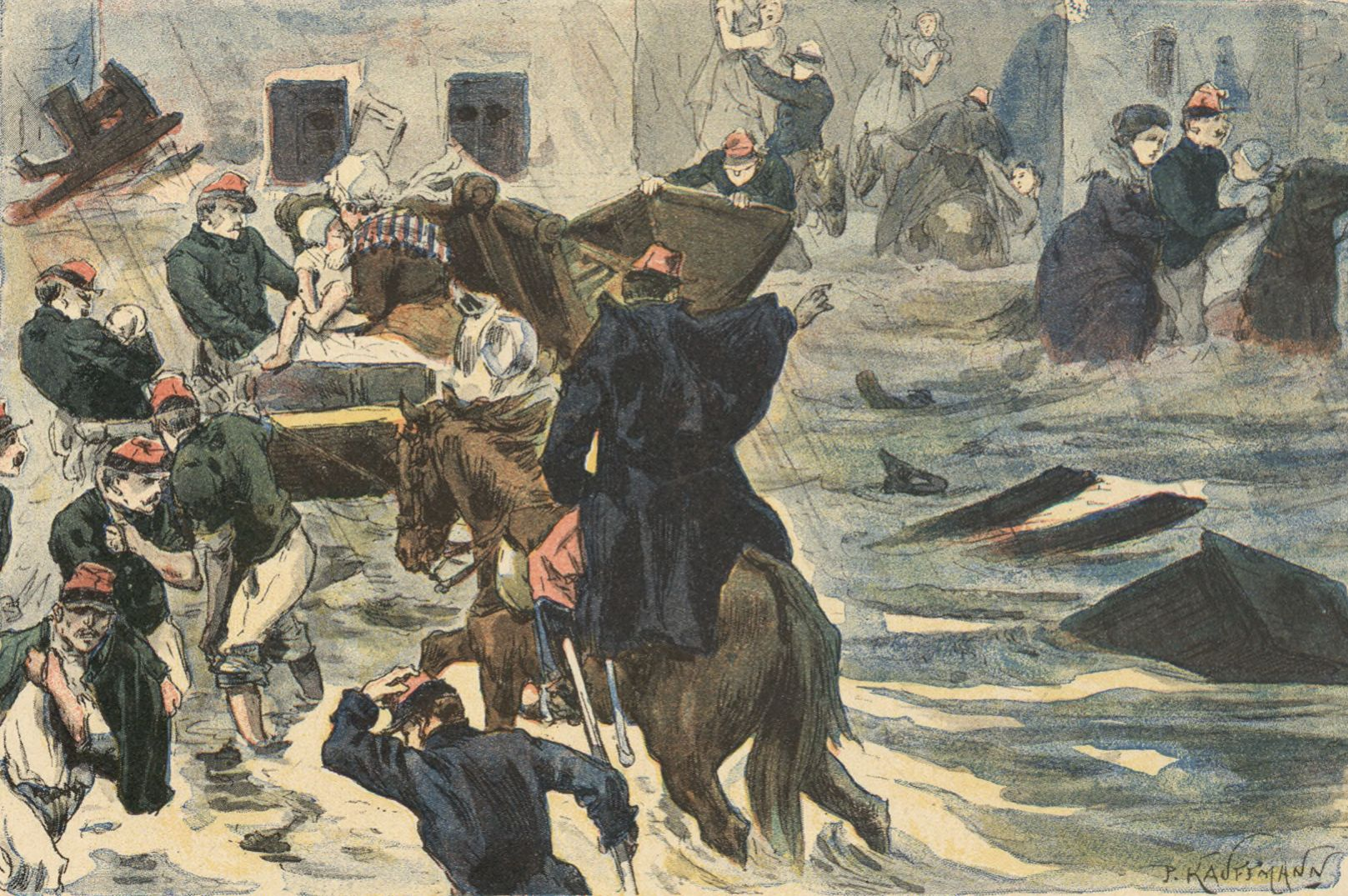 Le 10 juillet 1849, une trombe inonde la ville de Saint-Etienne où le 12e dragons est en garnison. Pendant 2 jours et une nuit, les dragons rivalisent de zèle et de dévouement et donnent un exemple admirable. Les dragons Honart, Carle et Maurus sauvent d'une maison d'école inondée une femme et plus de 20 enfants. Le maréchal des logis Tartarot, au péril de sa vie, sauve une femme en l'emportant sur son cheval. Pendant les 2 jours que dure l'inondation, on voit les dragons sur tous les points dangereux, disputant les victimes au torrent furieux et se sacrifiant sans compter pour le salut des populations.